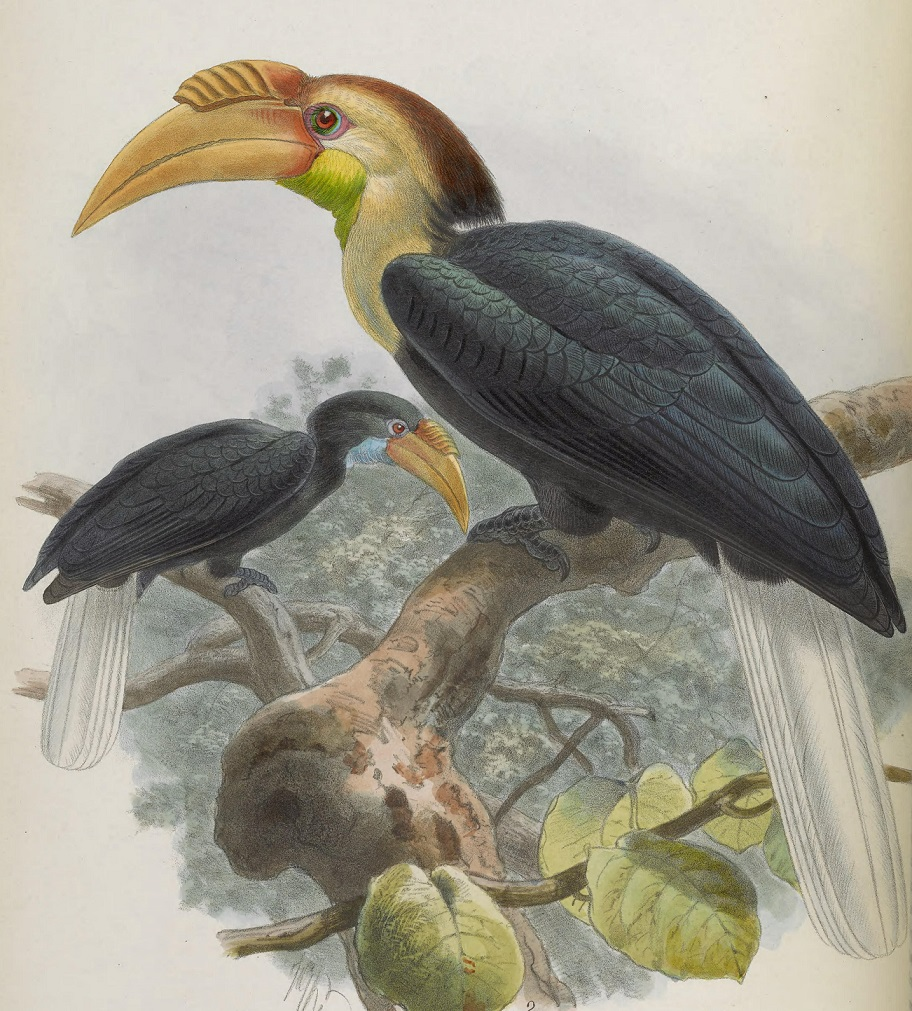 Rhyticeros subruficollis, Blyth, 1843